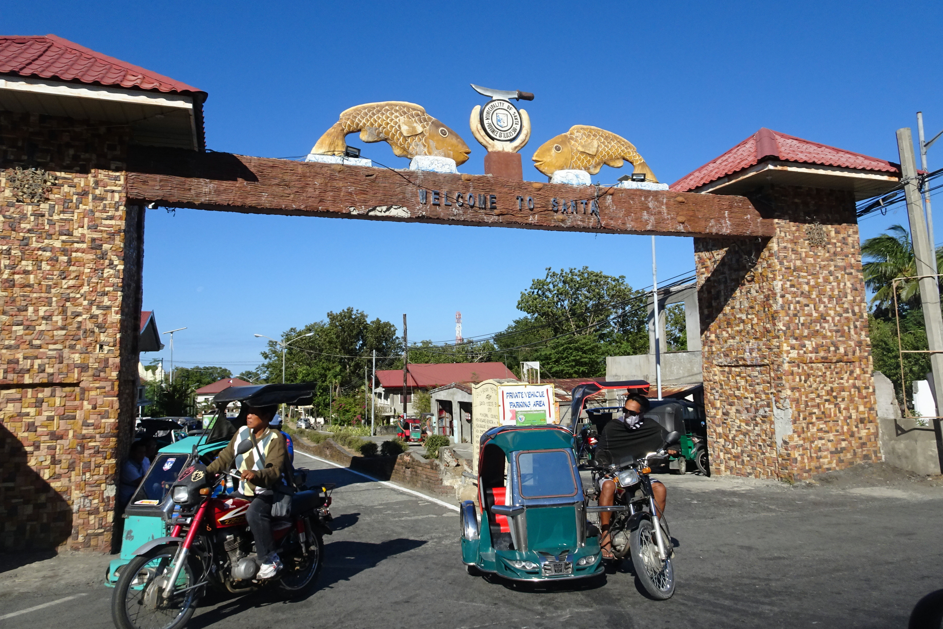 Santa, Ilocos Sur, Philippines